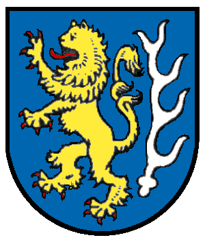 Wappen von Schwabsberg in Rainau, Germany, Baden-Württemberg